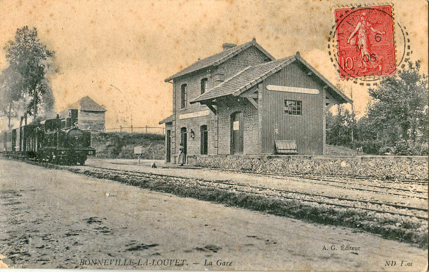 Carte postale ancienne éditée par ND Phot et A. G. Editeur :BONNEVILLE-LA-LOUVET - La Gare